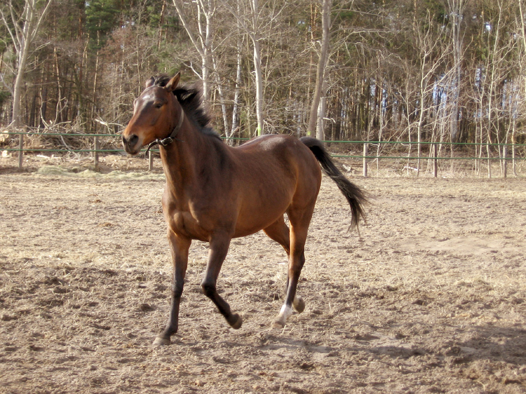 Anglo-Araber(Lion King aa)